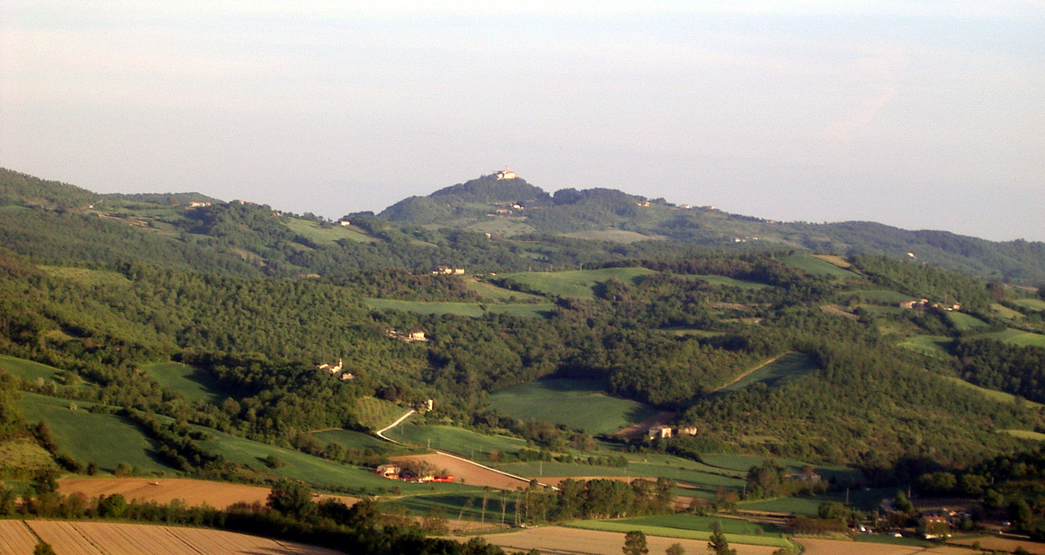 Monte Santa Maria Tiberina Umbria Italy